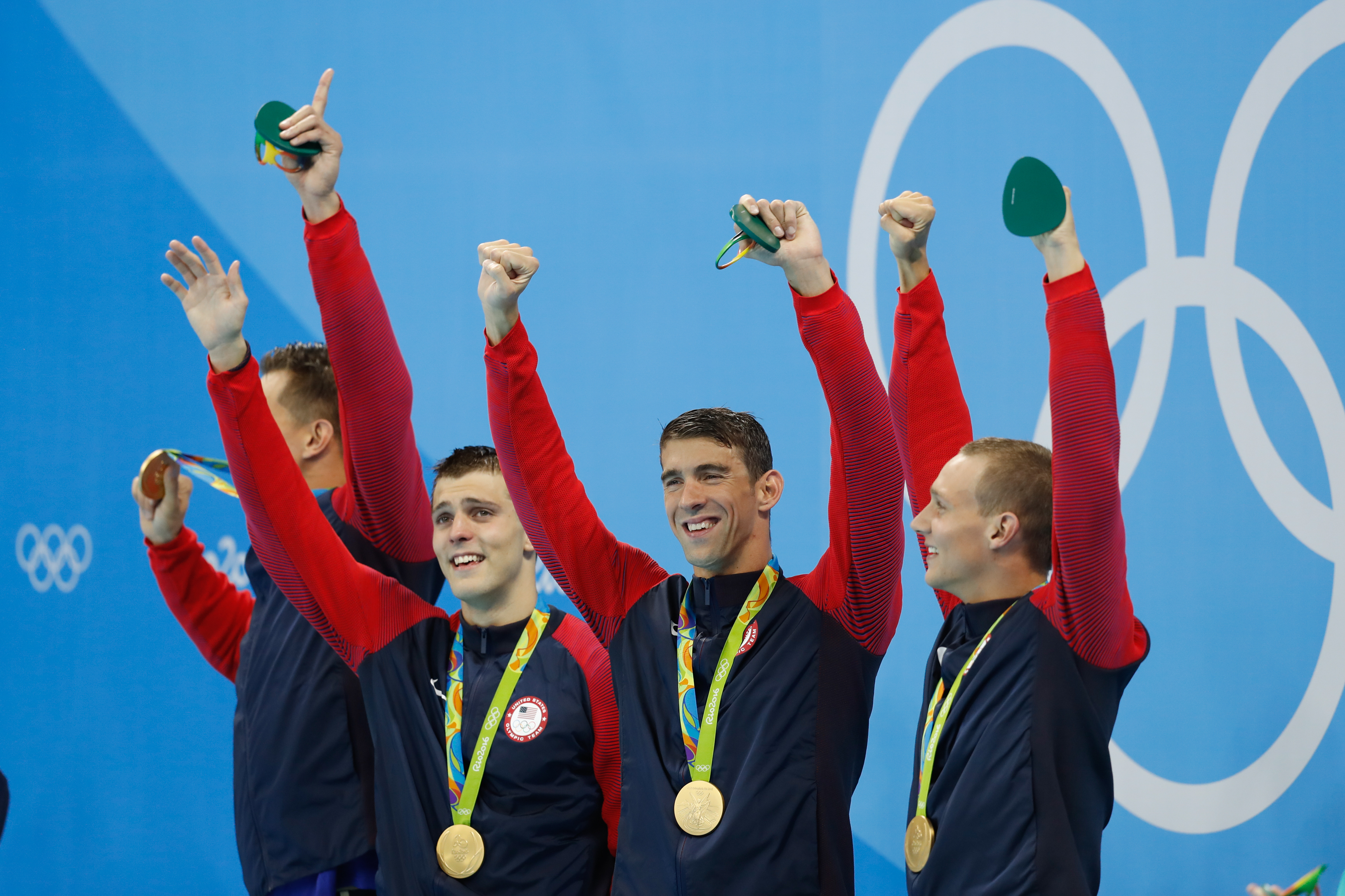 Rio de Janeiro - Estados Unidos vence o revezamento 4 x 100m nado livre nos Jogos Olímpicos Rio 2016, no Estádio Aquático.